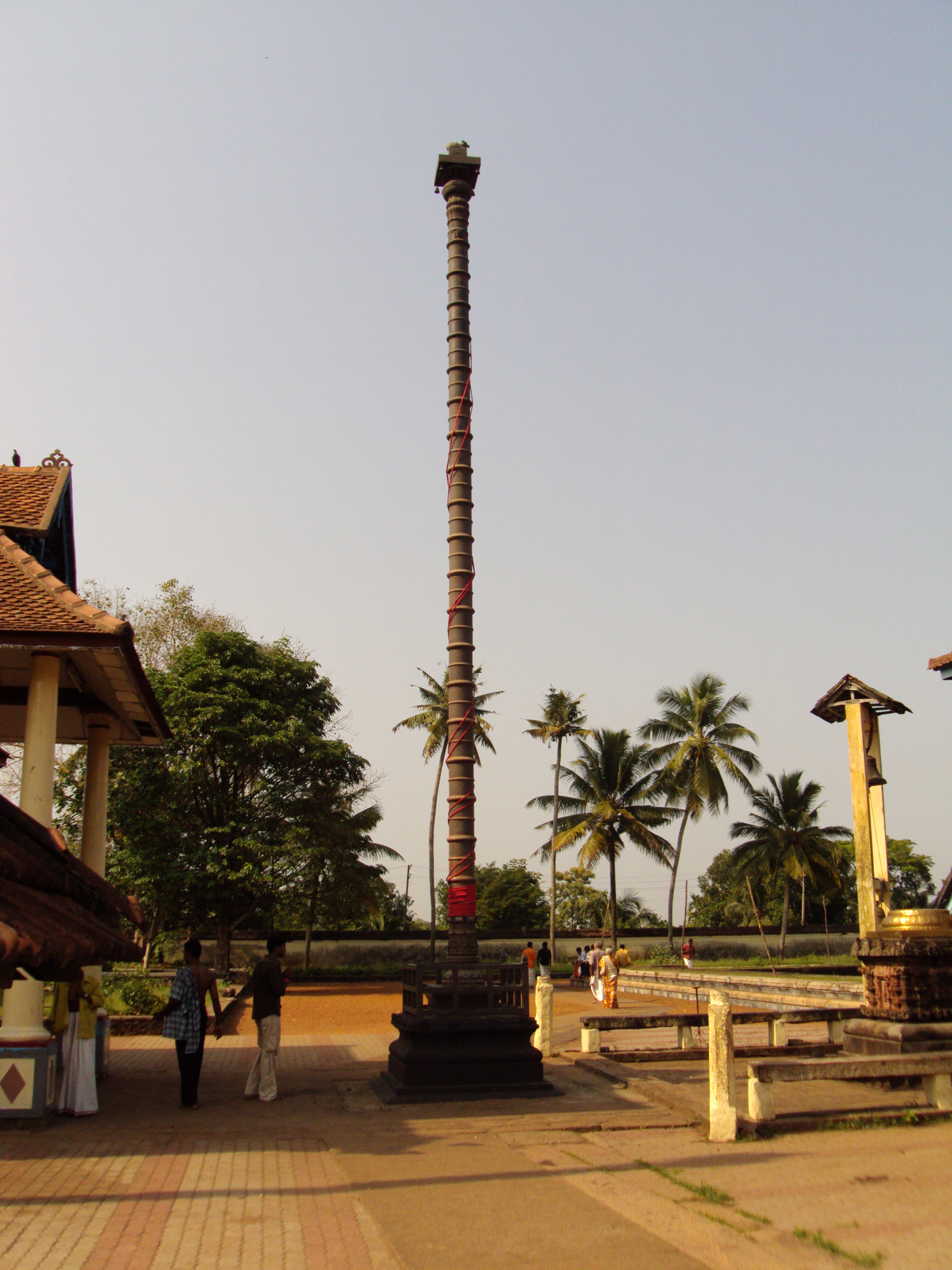 വാഴപ്പള്ളി മഹാദേവനടയിലെ ധ്വജസ്തംഭം